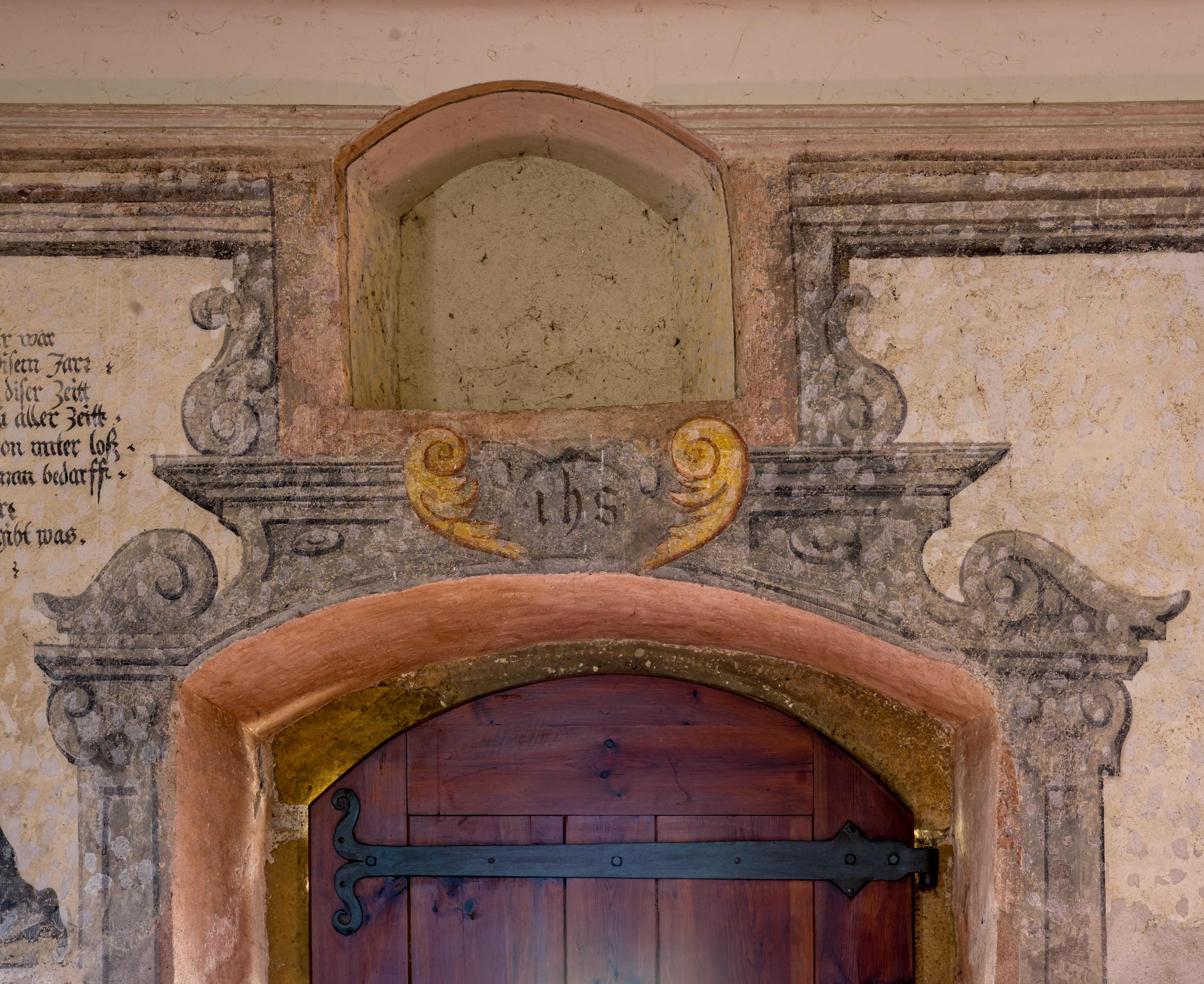 Bilder aus Staufen im Breisgau, die St. Magdalenenkapelle